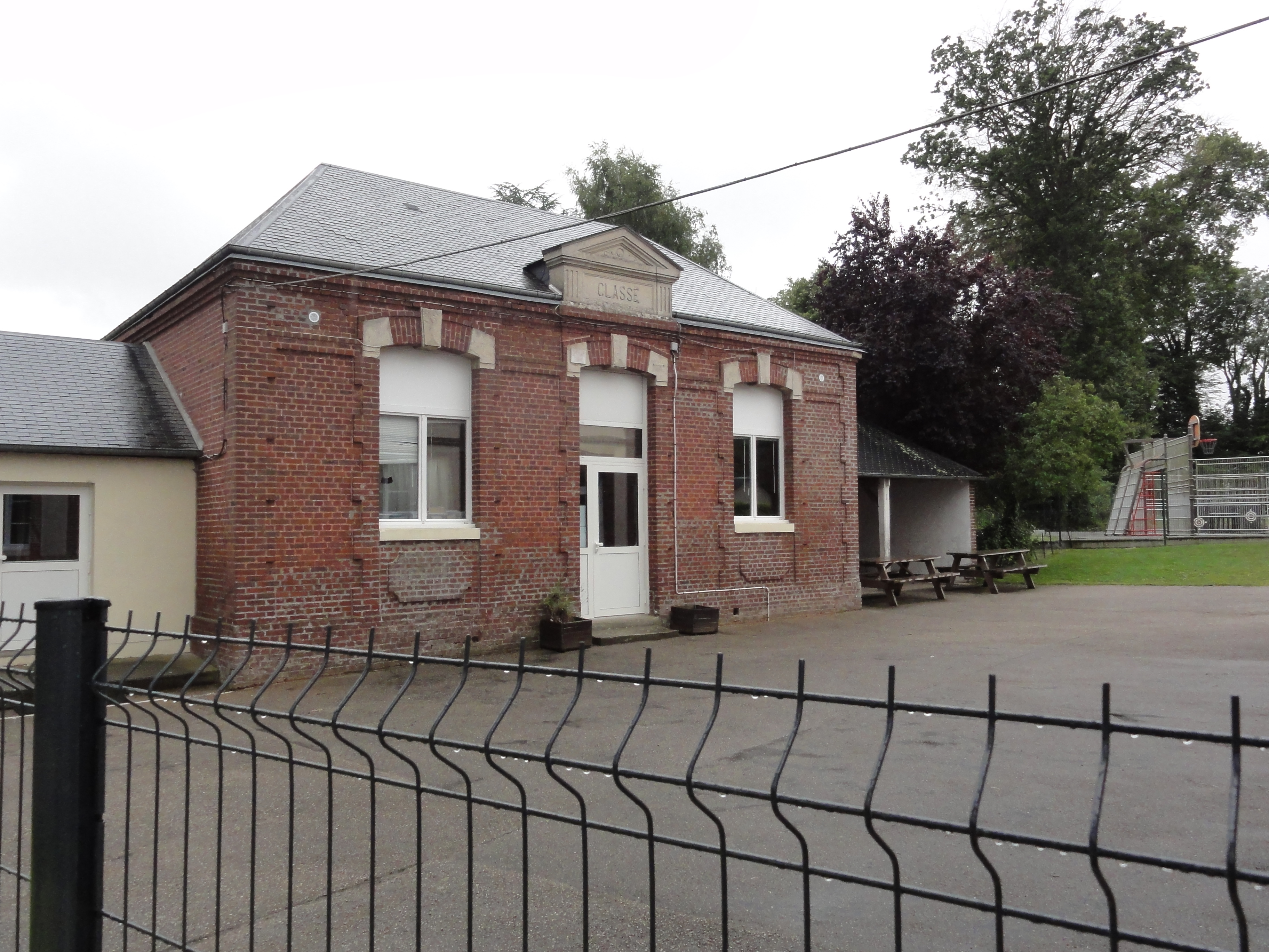 Angerville-Bailleul (Seine-Mar.) école